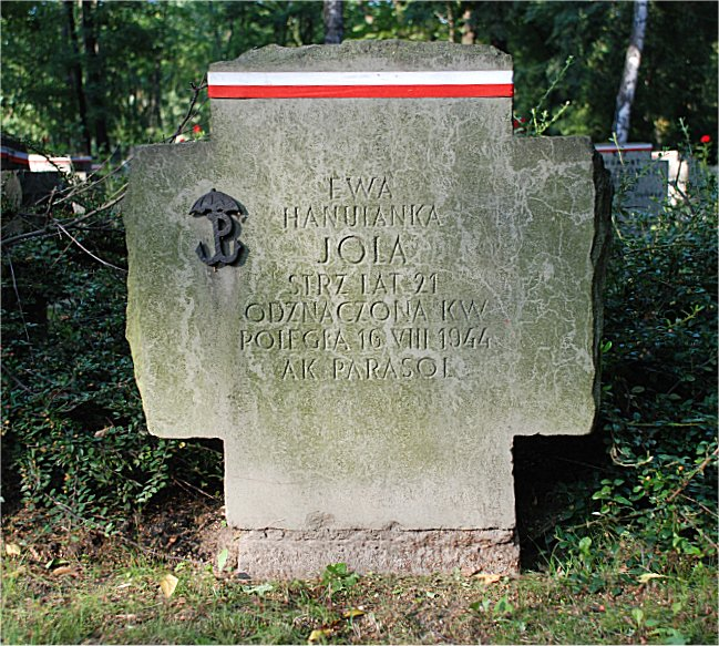 Grób E. Hanulanki na Powązkach wojskowych w Warszawie